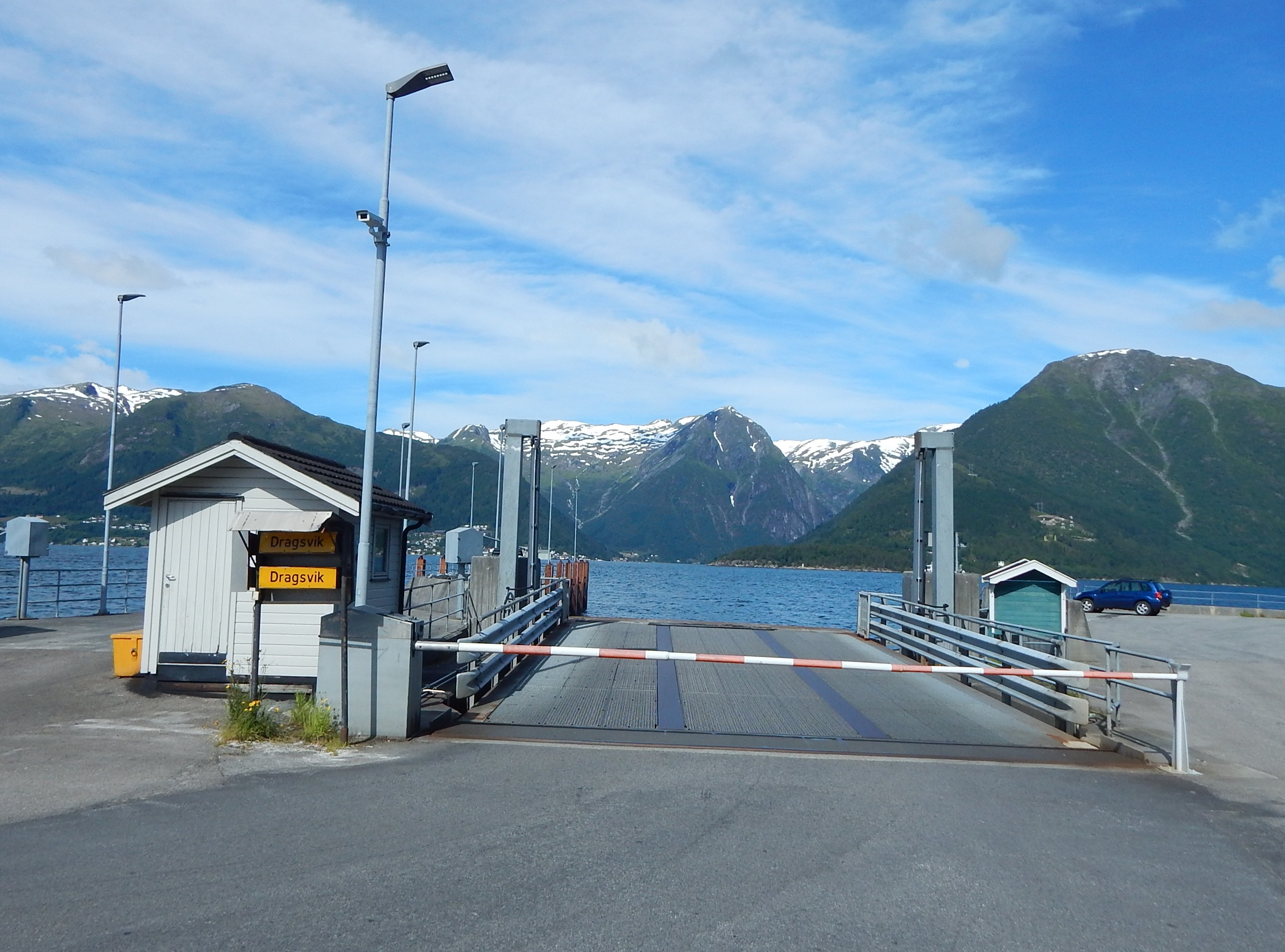 Hella fergekai